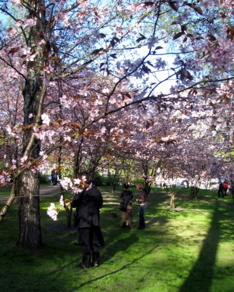 Ihmisiä ihastelemassa kirsikan kukkia Roihuvuoren japanilaistyylisessä puutarhassa